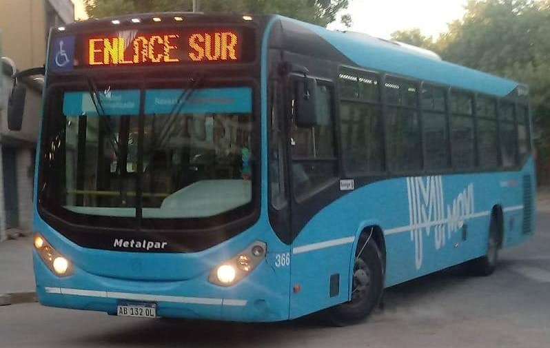 Interno 366 de la línea Enlace Sur, cuya propietaria es la empresa Movi